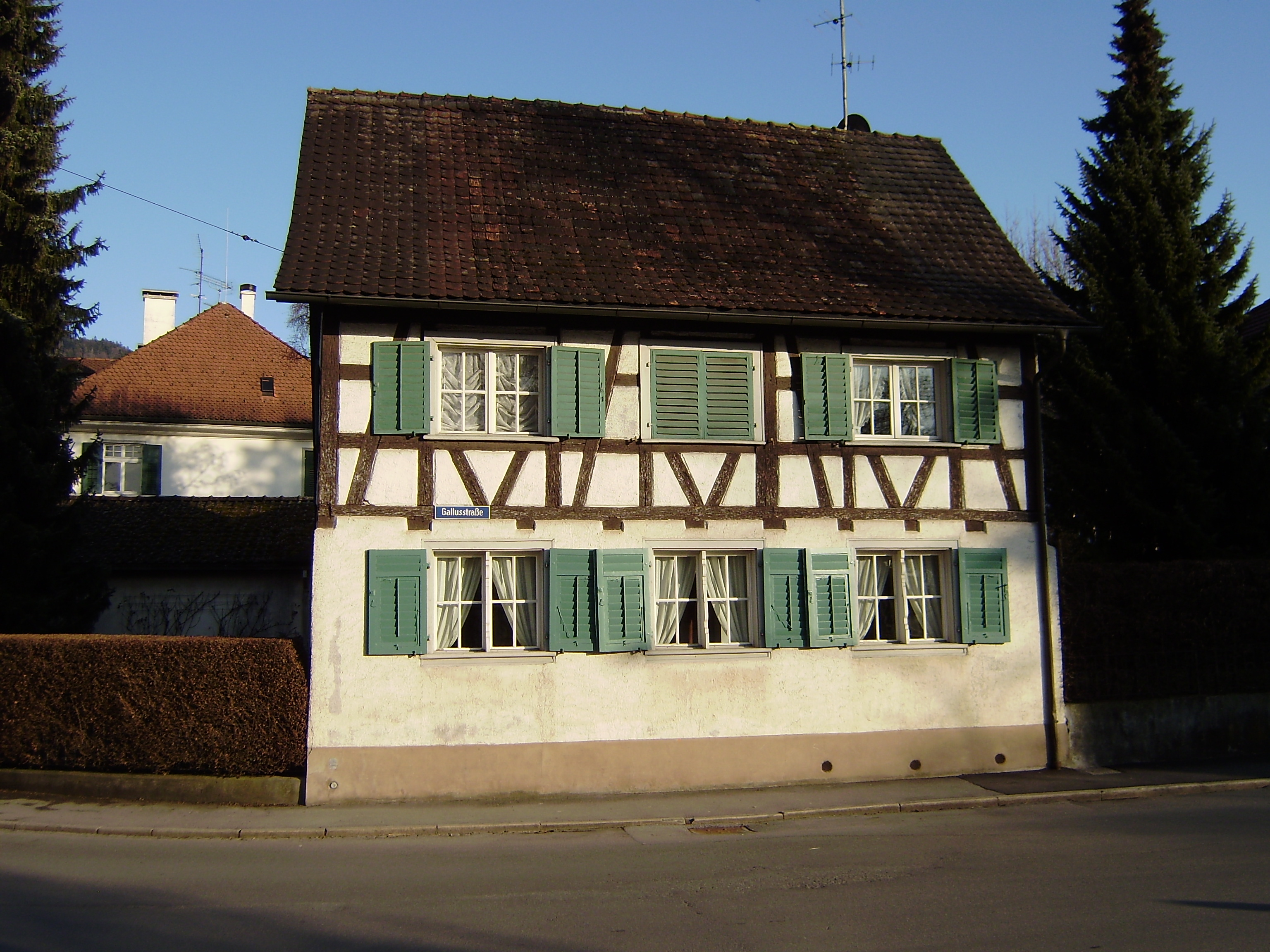 Haus der Hundsgräfin Emilie Kraus von Wolfsberg in Bregenz (Vorarlberg). Ansicht von Westen